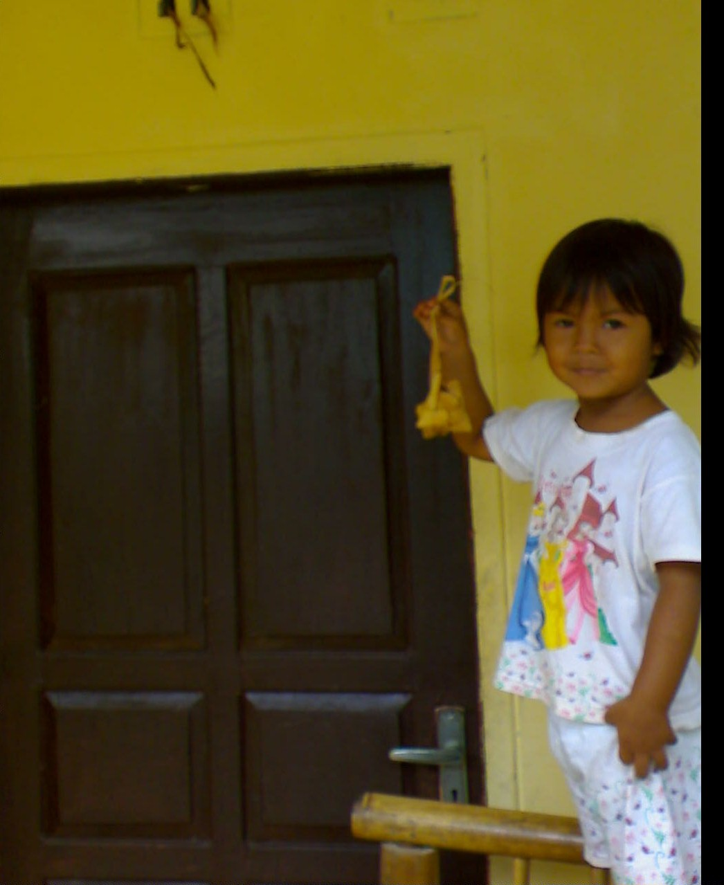 Seoranng anak sedang menggantung ketupat selamet di pintu masuk rumah.